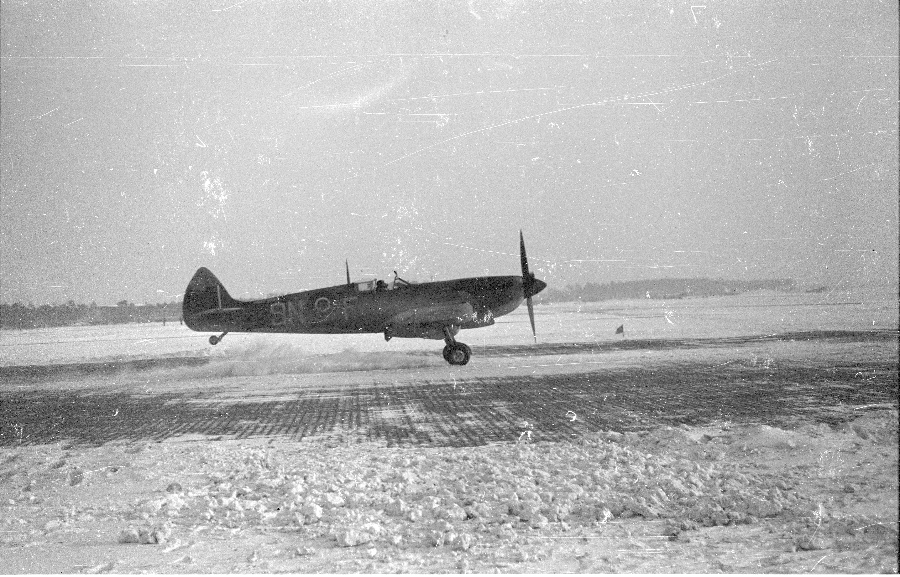 Bildet er hentet fra Arkivverket. Norske flyvere på kontinentet Arkivinstitusjon : Riksarkivet Arkivnavn : NTBs krigsarkiv Sted : UKJENT LAND, 00 Ukjent, 00 Ukjent, Emneord: Andre verdenskrig Avbildet